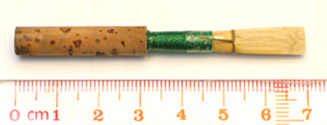 雙簧管用的簧片/Reed for Oboe 牌子(Brand)：LaWoz, Medium Soft 自製圖片，現公開予所有人使用 創建者：Glio glio 14:58 2005年12月20日 (UTC)